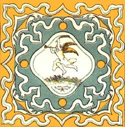 Bandiera della magistratura di Calci del Gioco del Ponte di Pisa